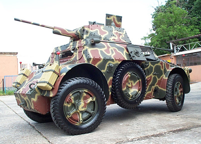 Autoblinda SPA 41/43 - 1943, esercito italiano (a colori)